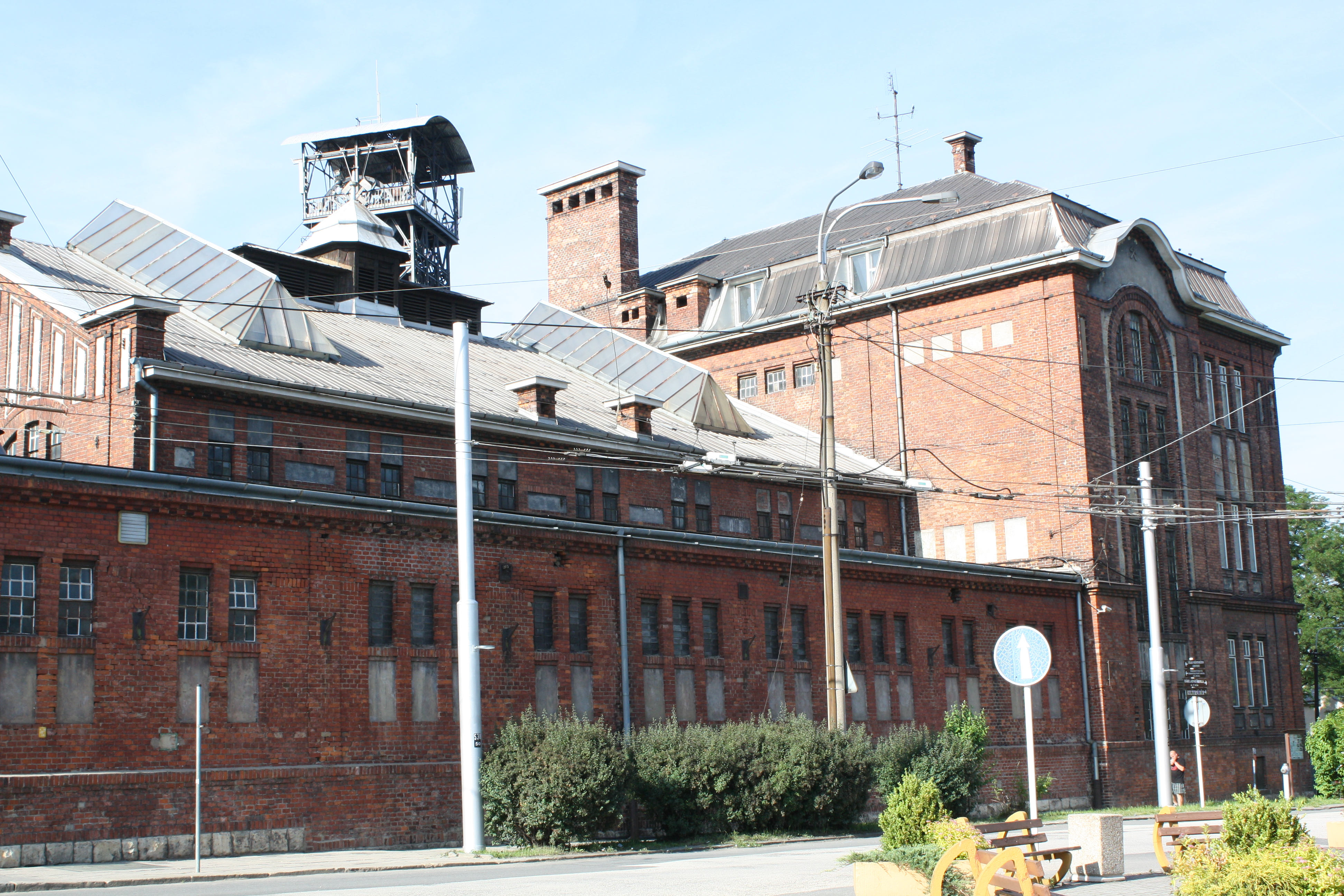 Důl Michal - Ostrava-Michálkovice, v současnosti slouží jako muzeum hornictví.